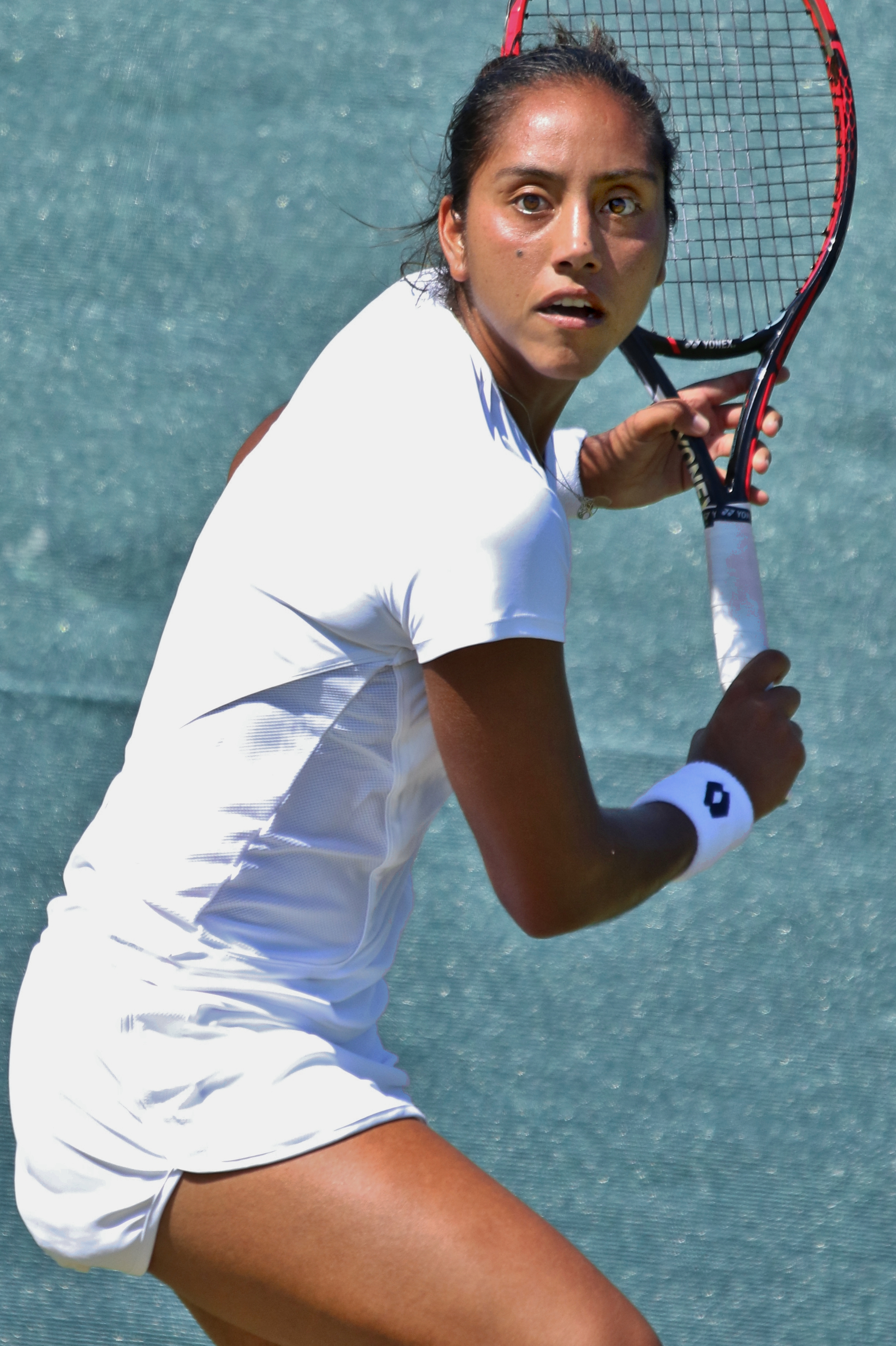 Seguel WMQ18 (28)